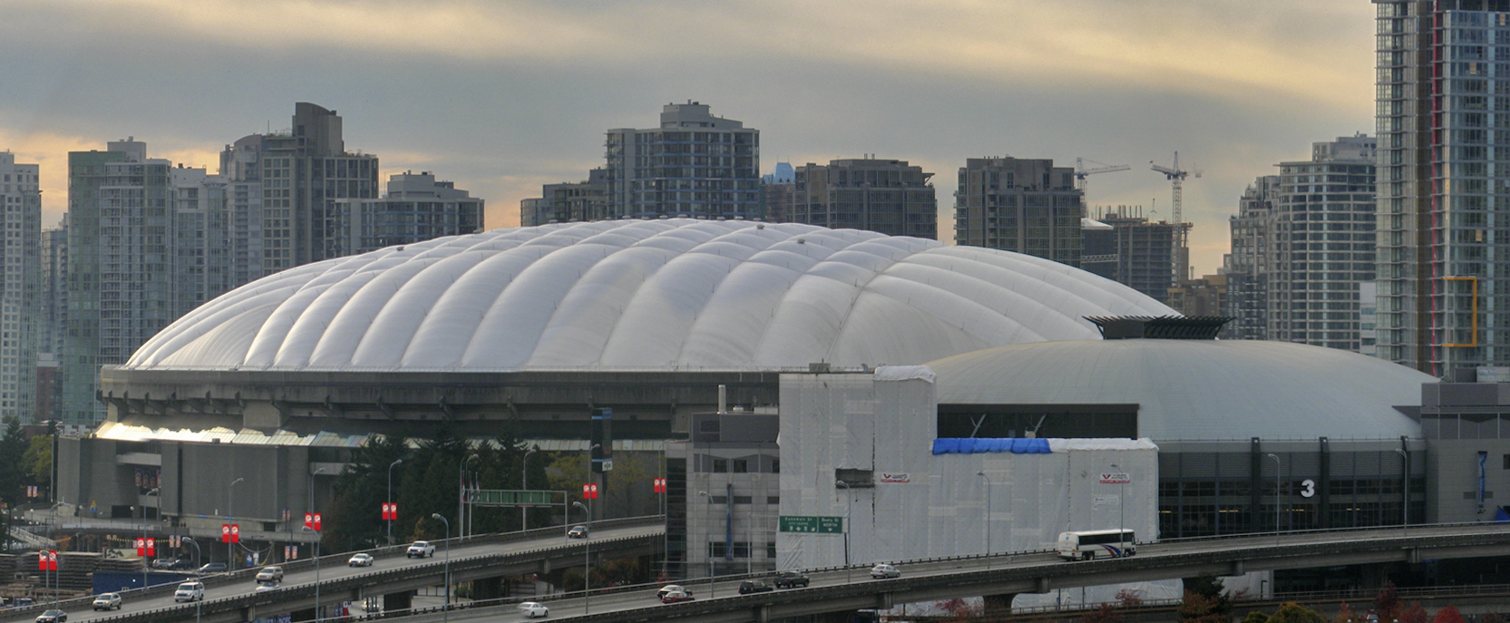 BCPlace Stadium, Vancouver